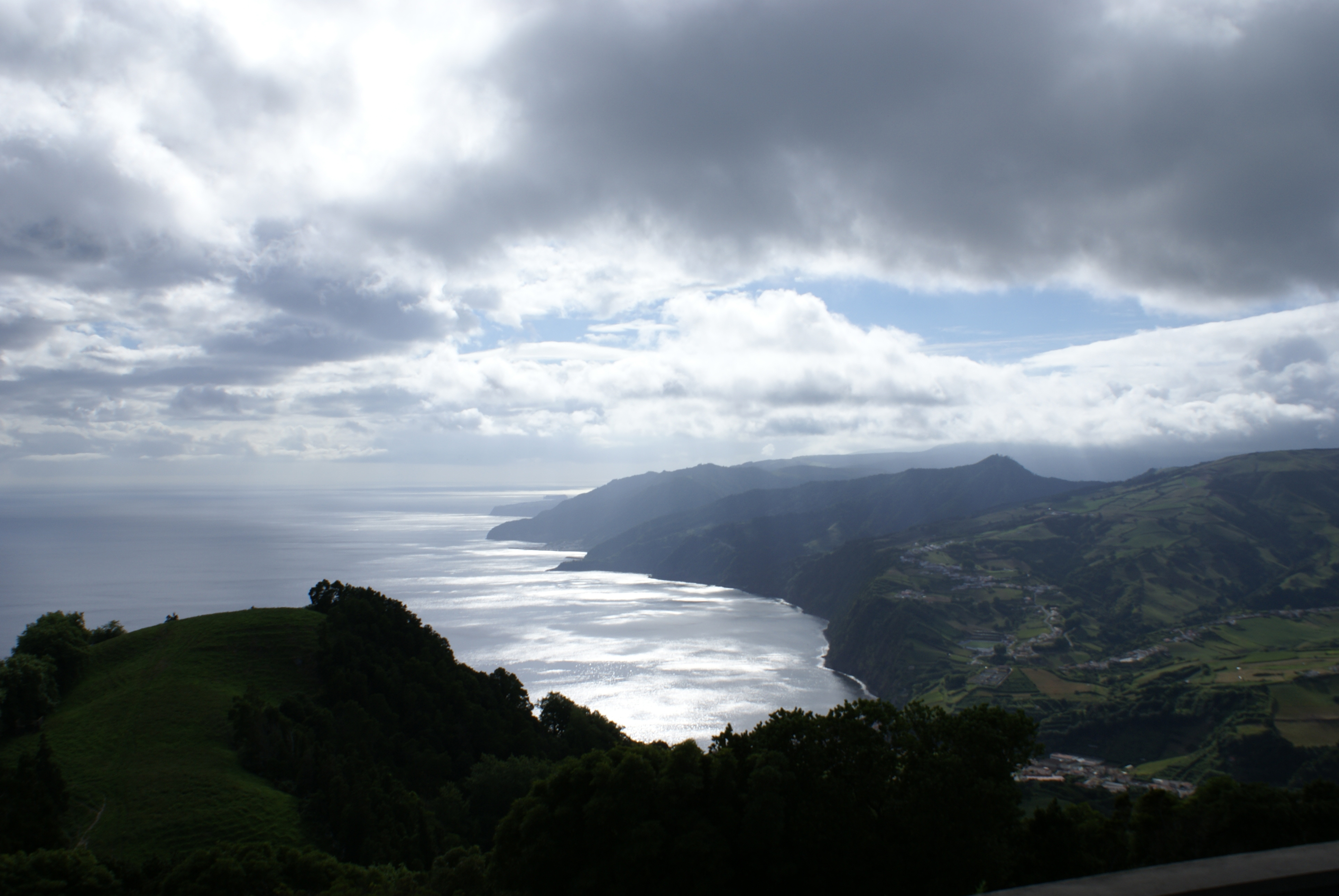 Miradouro do Pico dos Bodes, terra e mar, Ribeira Quente, Povoação, ilha de São Miguel, Açores